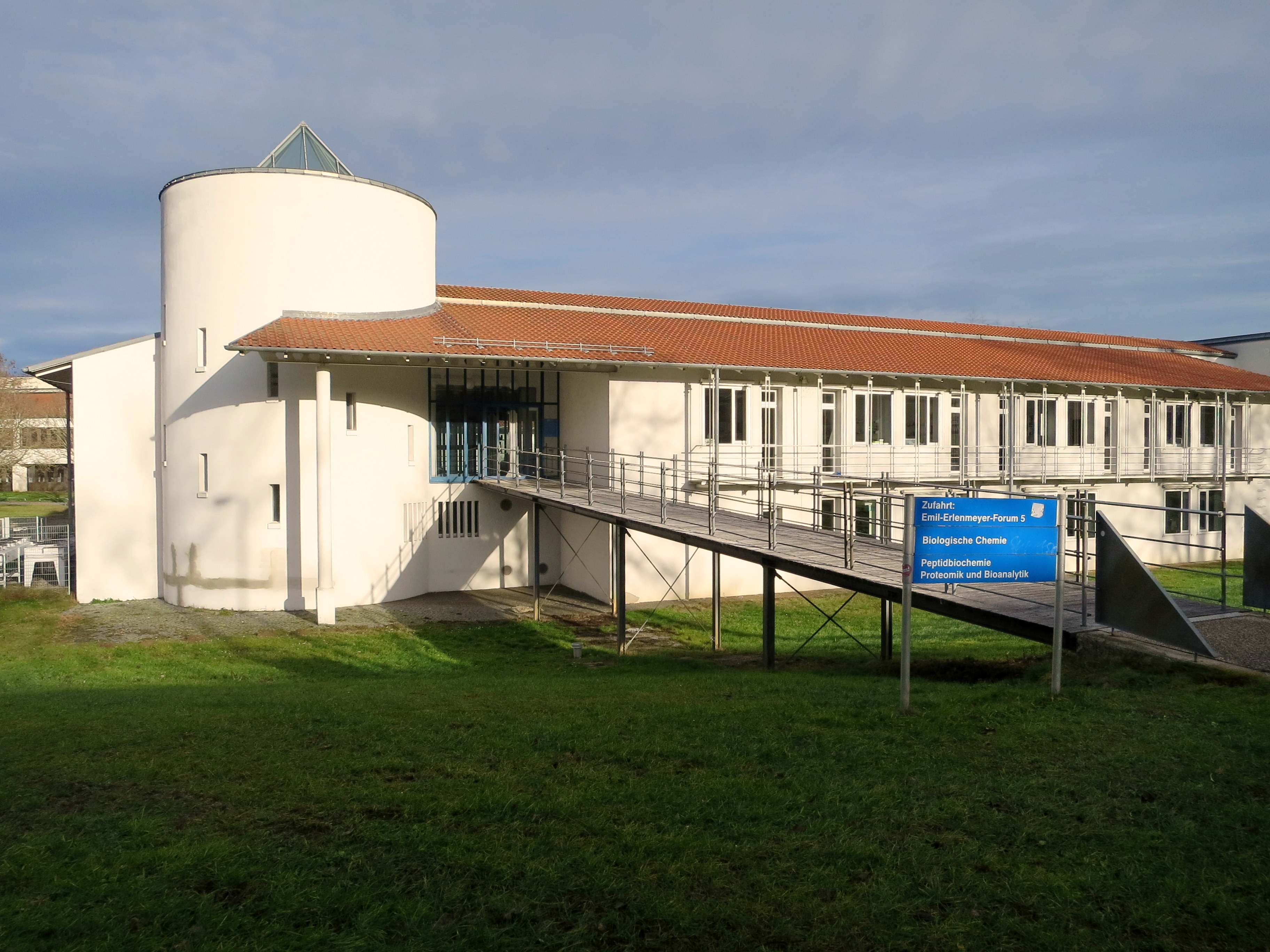 Das Gebäude steht gleich am Rang und ist der Sitz mehrerer Lehrstühle.